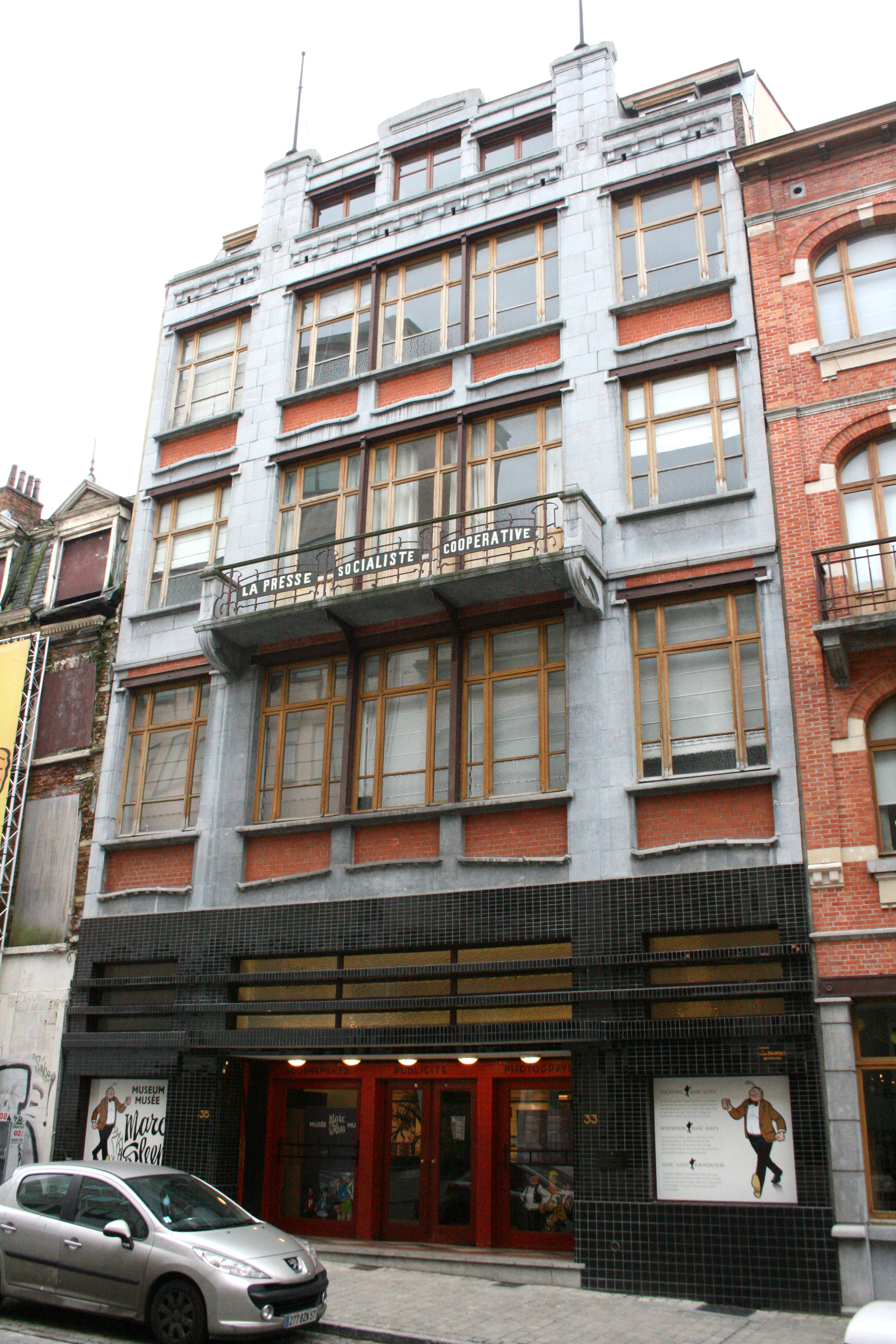 Rue des Sables 33, Bruxelles (Belgiques). Ancien bâtiment de la Presse socialiste. Architecte: Richard Pringiers (1905), actuellement musée Marc Sleen.